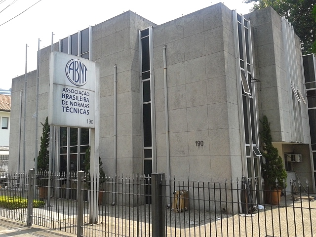 Prédio da Associação Brasileira de Normas Técnicas (ABNT) na Higienópolis, distrito da Consolação, São Paulo, SP, Brasil.